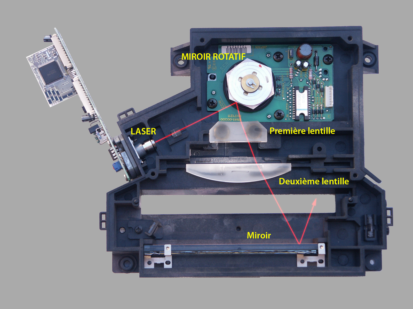 Mécanisme de génération du laser d'une imprimante laser avec légendes. Provenant du démontage d'une Apple LaserWriter Color 12/660.